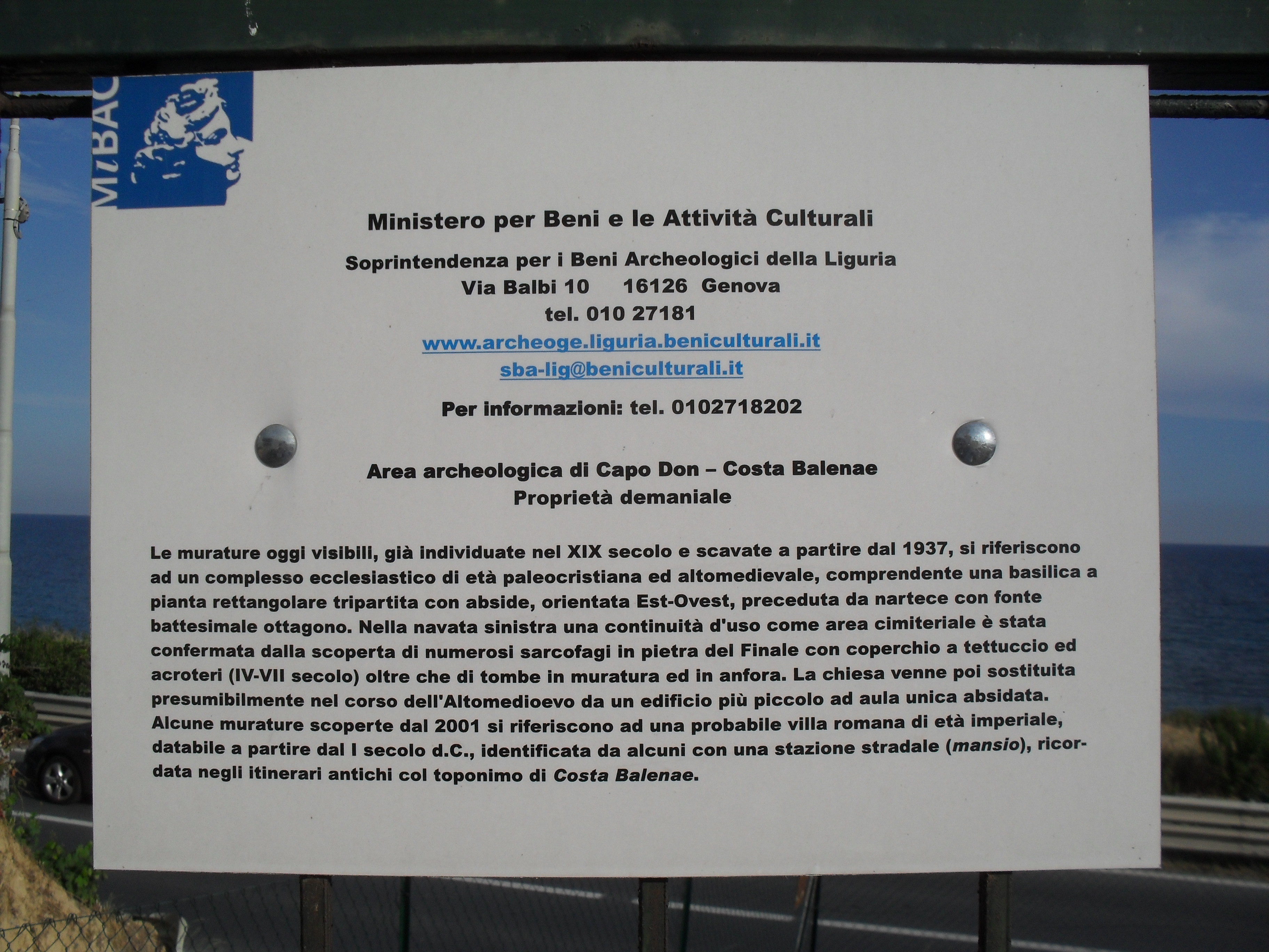 Cartello posto all'ingresso dell'area archeologica di Costa Balenae, Riva Ligure (IM)